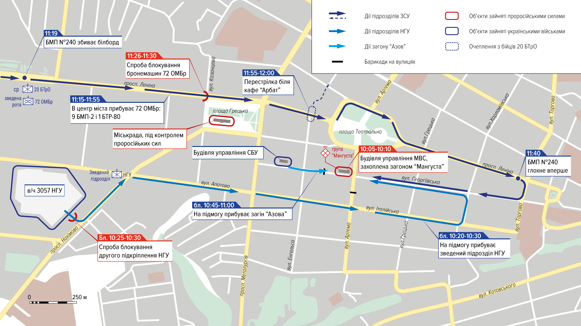 Бої в Маріуполі 09.05.2014. Українські війська прибувають в центр міста.